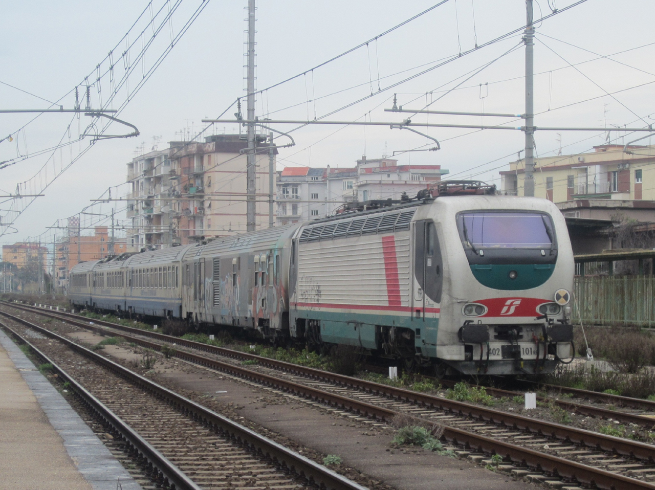 Treno diagnostico Archimede in sosta a Napoli Campi Flegrei.